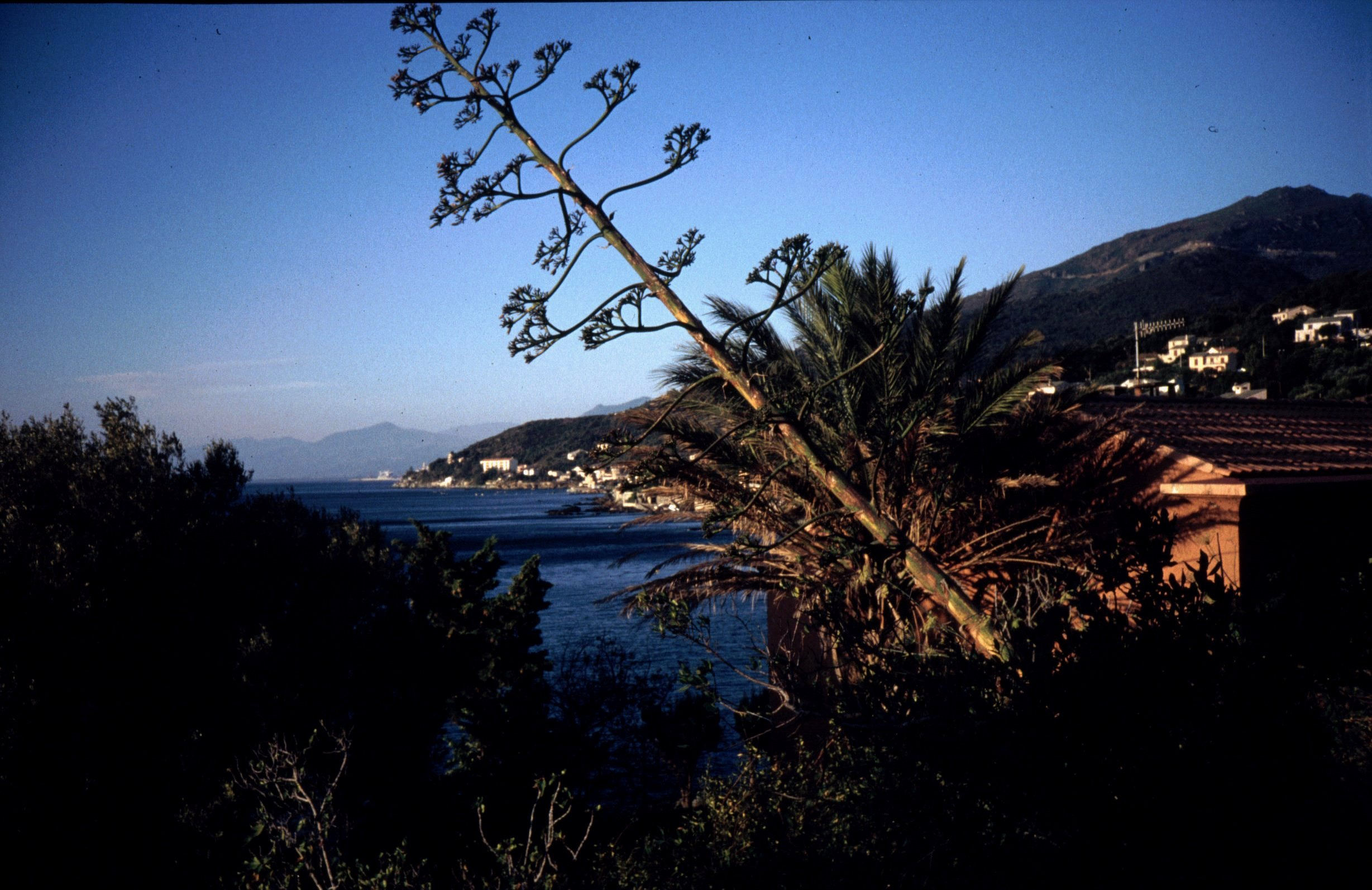 Bild-Beschreibung Beschreibung: Cpa Corse Onstkürste - Blick Richtung Bastia Quelle: Selbstfotografiert Fotograf oder Zeichner: Birgit Lachner Andere Versionen: - Lizenzstatus: GNU FDL